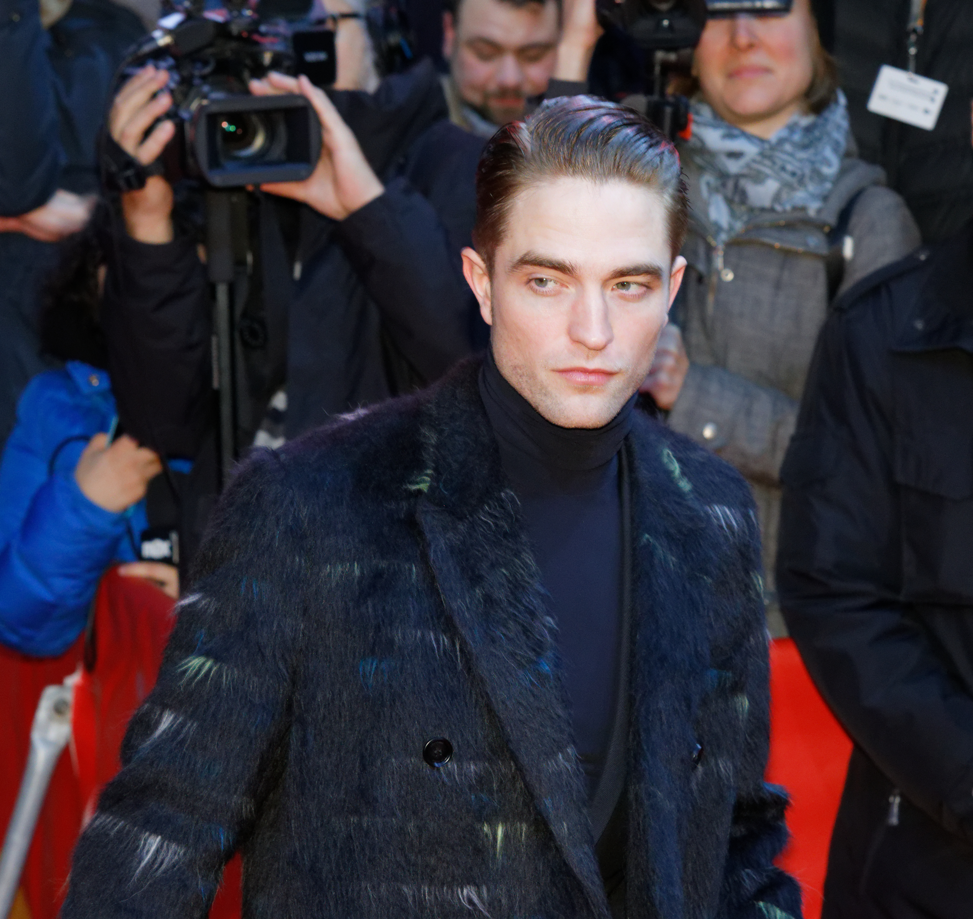 Robert Pattinson bei der Premiere von Die versunkene Stadt Z im Zoo Palast bei der Berlinale 2017